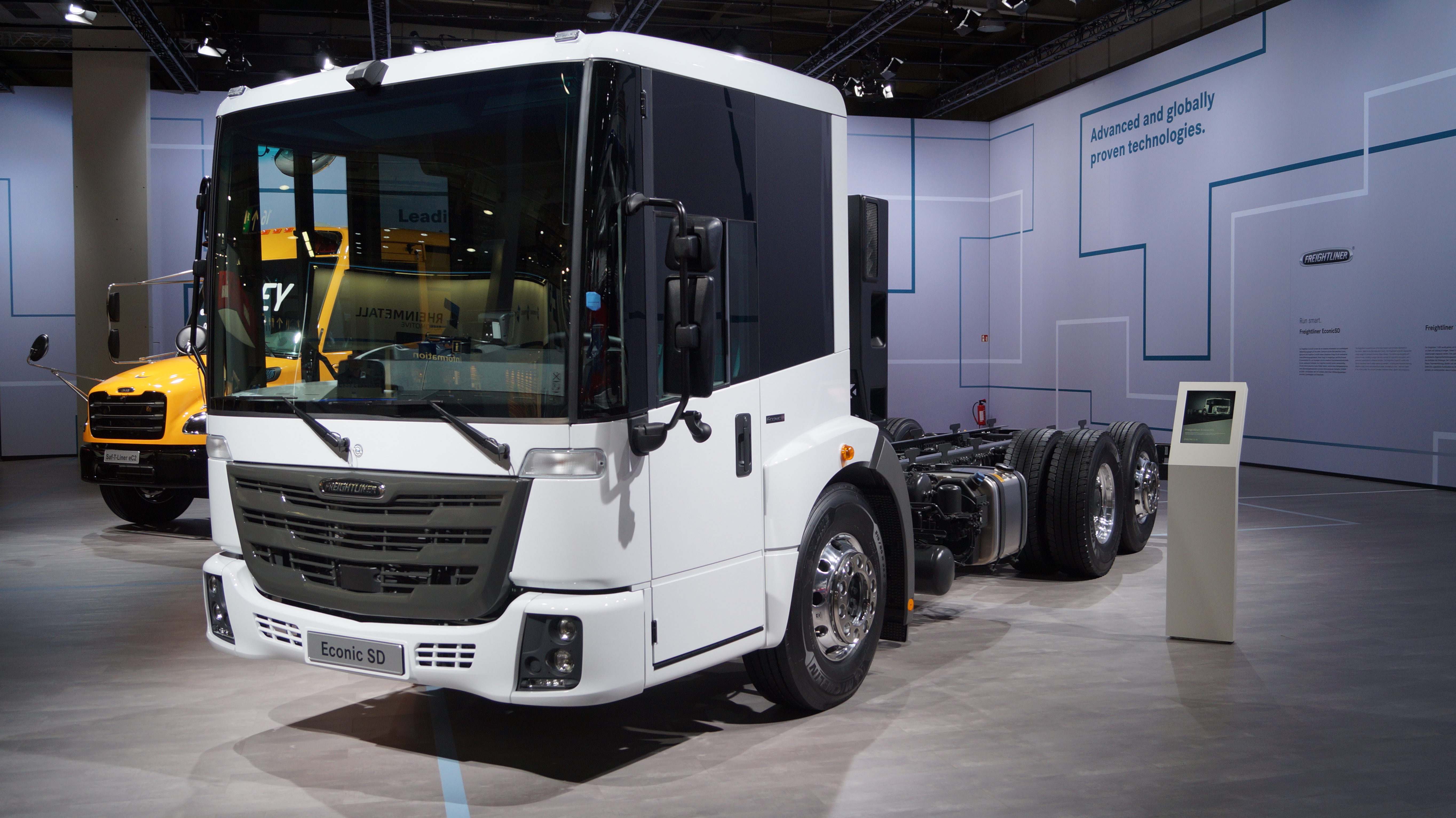 Schrägansicht der Front eines Freightliner EconicSD, ausgestellt auf der IAA 2018.